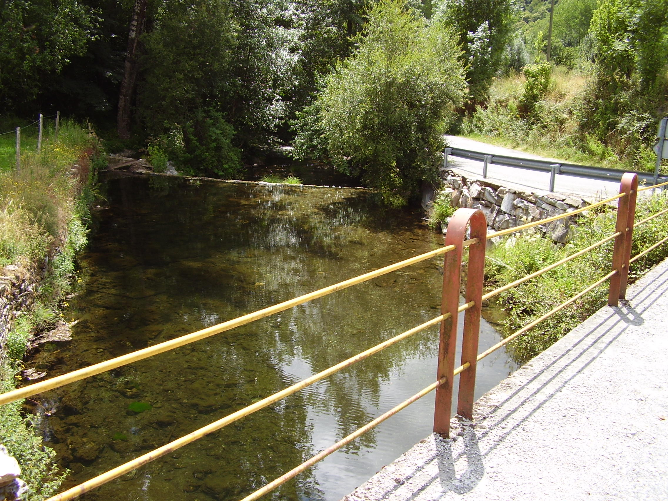 El río Lóuzara en el pueblo de Ponte (Samos)